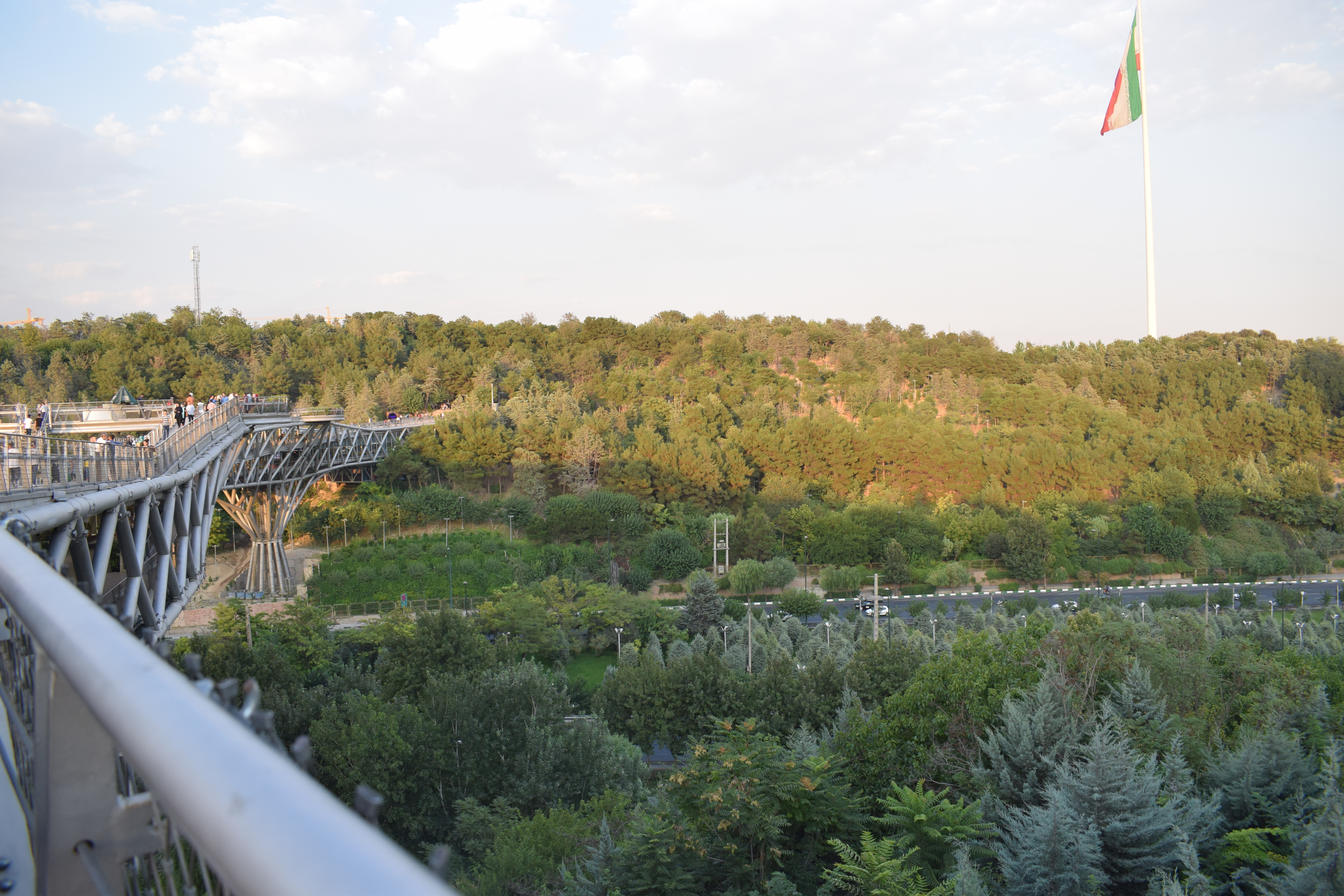 نمایی از کناره پل طبیعت